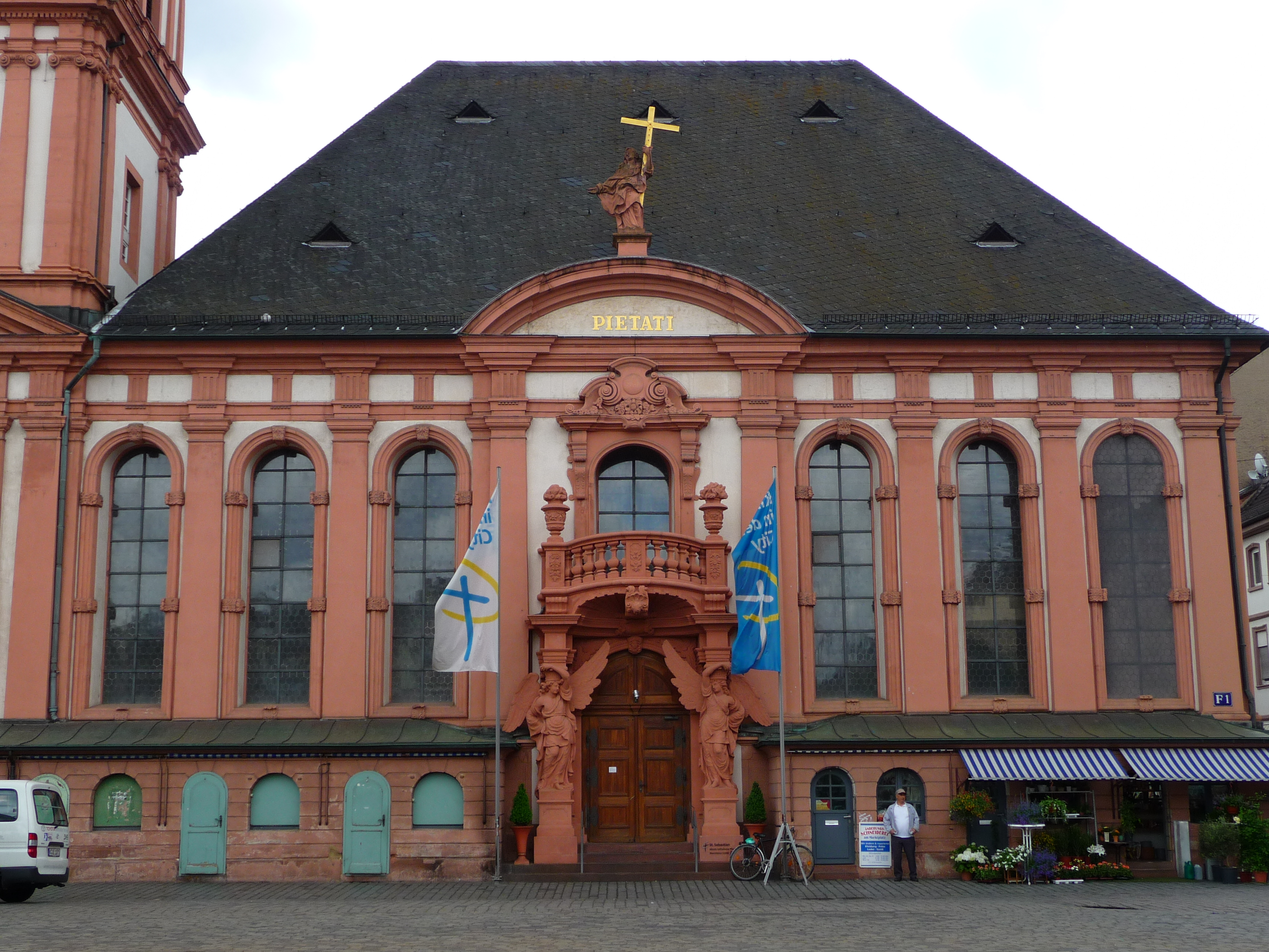 Blick auf das Seitenschiff der 1706 erbauten katholischen Kirche St. Sebastian in Mannheim (Baden-Württemberg, Deutschland)